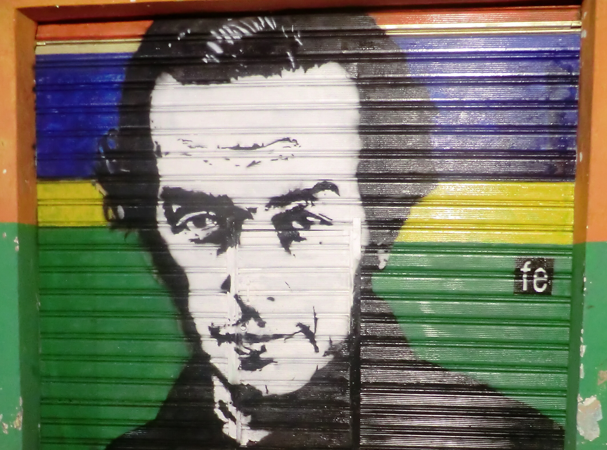 Pintura / Stencil. Aquiles Nazoa por el artista urbano Fe. Intervención de una santamaría en El Hatillo, Caracas, Venezuela.